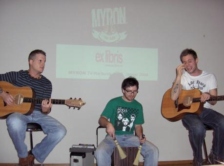 Myron bei einem privaten Gig